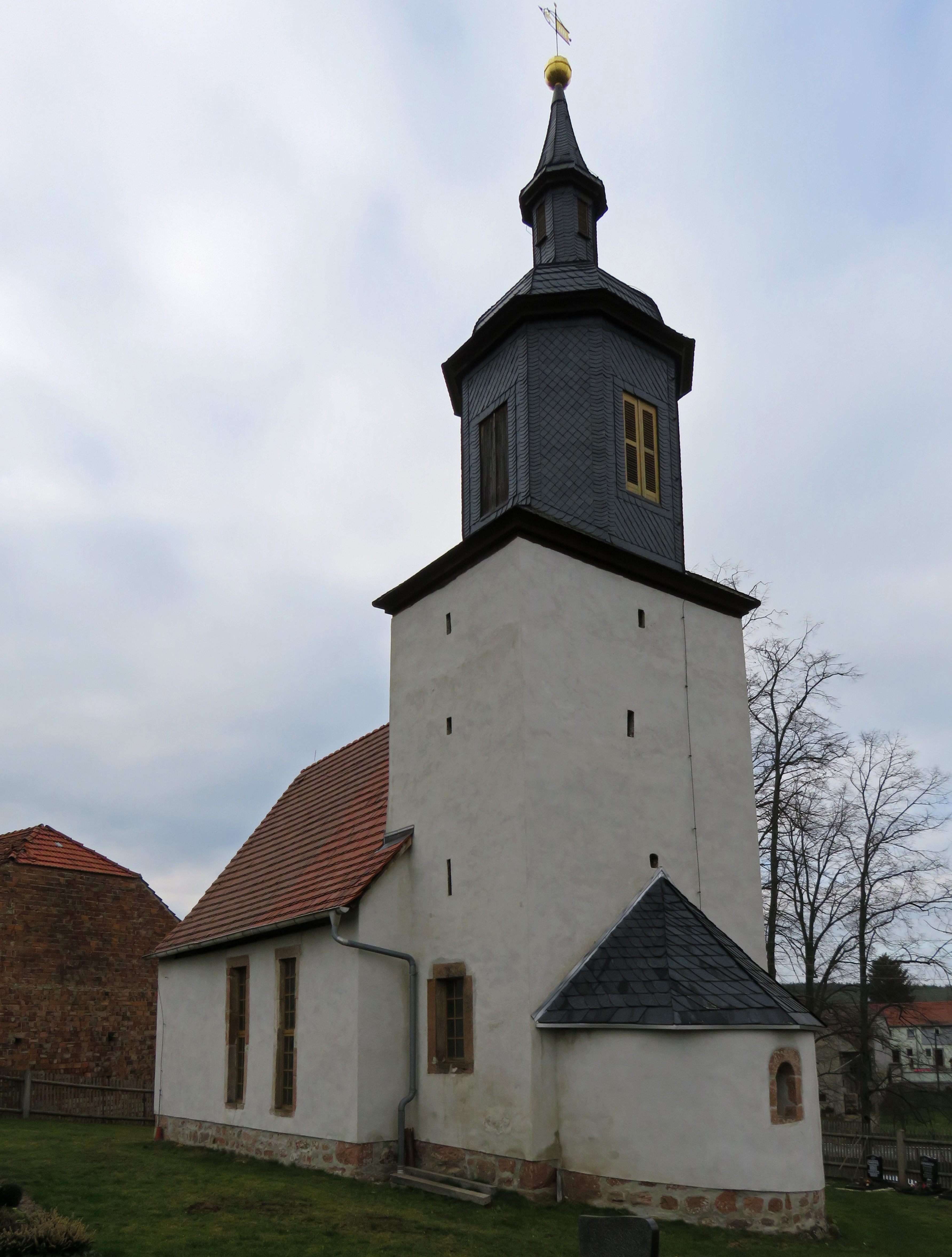 Dorfkirche Wittchenstein